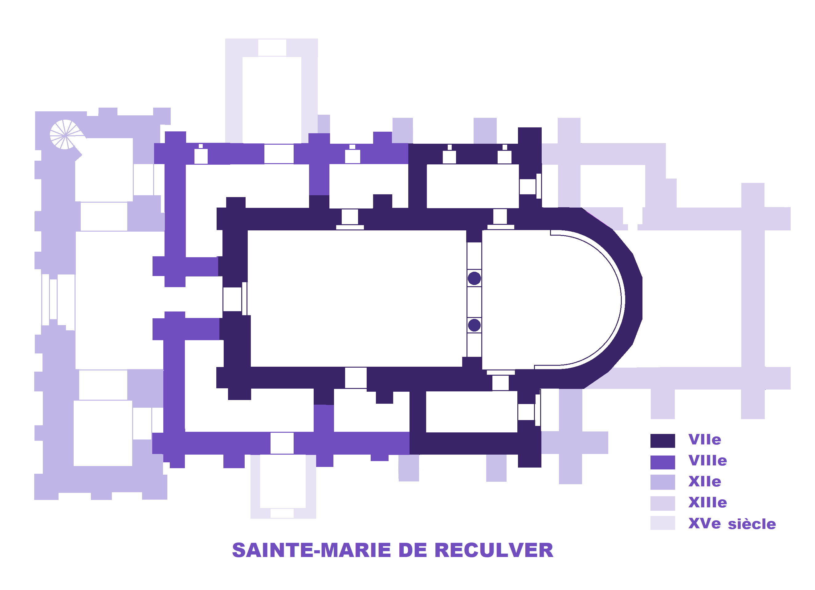 Eglise Sainte-Marie de Reculver, Angleterre, Plan